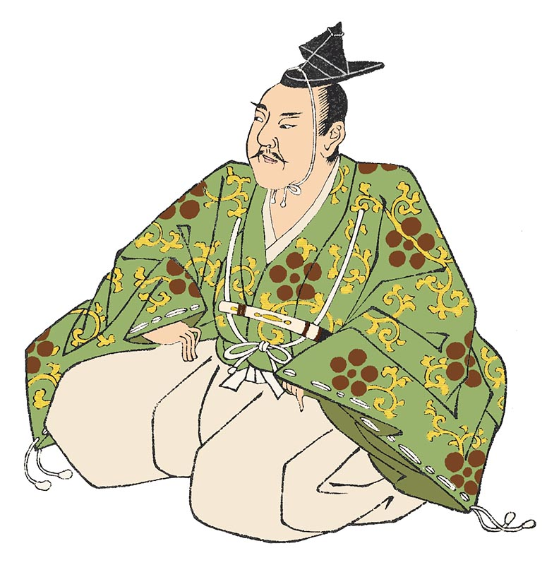 古田織部像（「茶之湯六宗匠伝記」より・彩色）